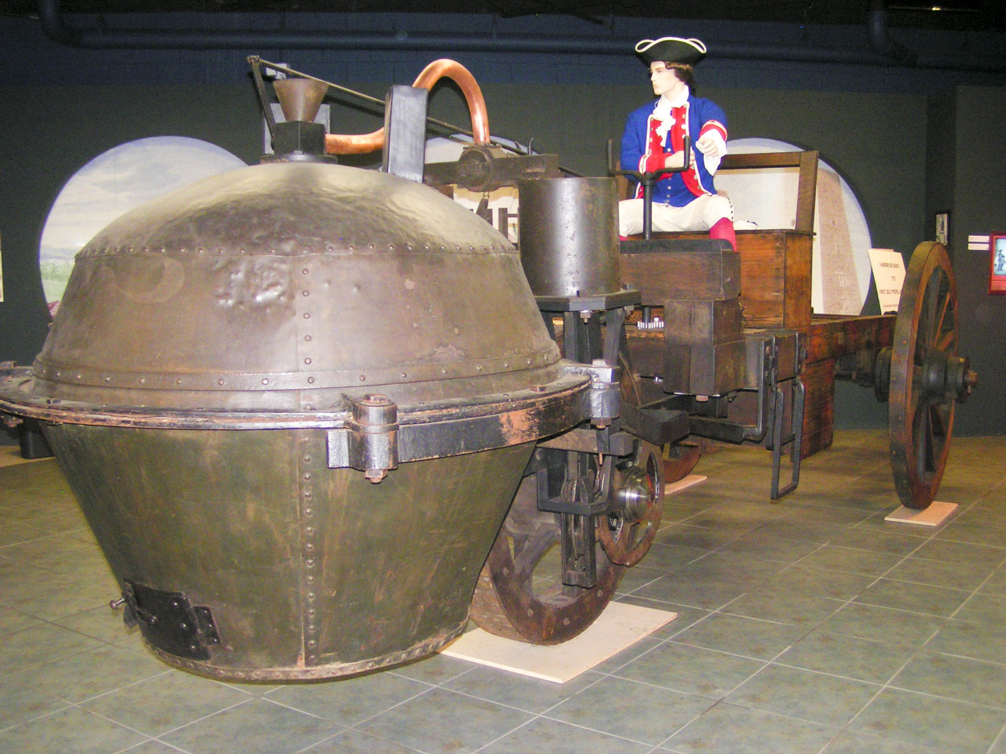 1770 Fardier de Cugnot